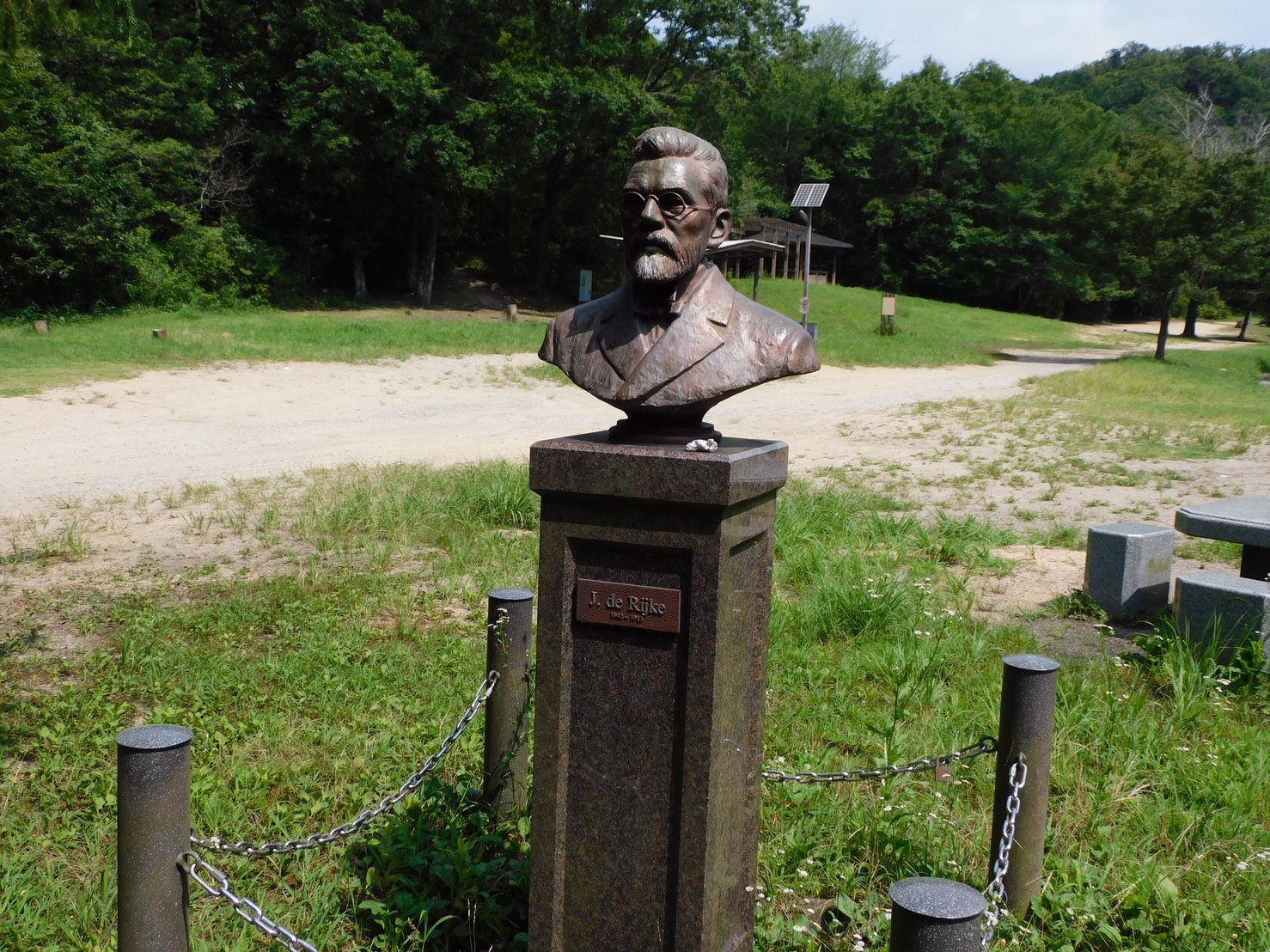 この写真は不動川砂防歴史公園内にある、ヨハニス・デ・レーケ像です。デ・レーケは、不動川の砂防に貢献しました。